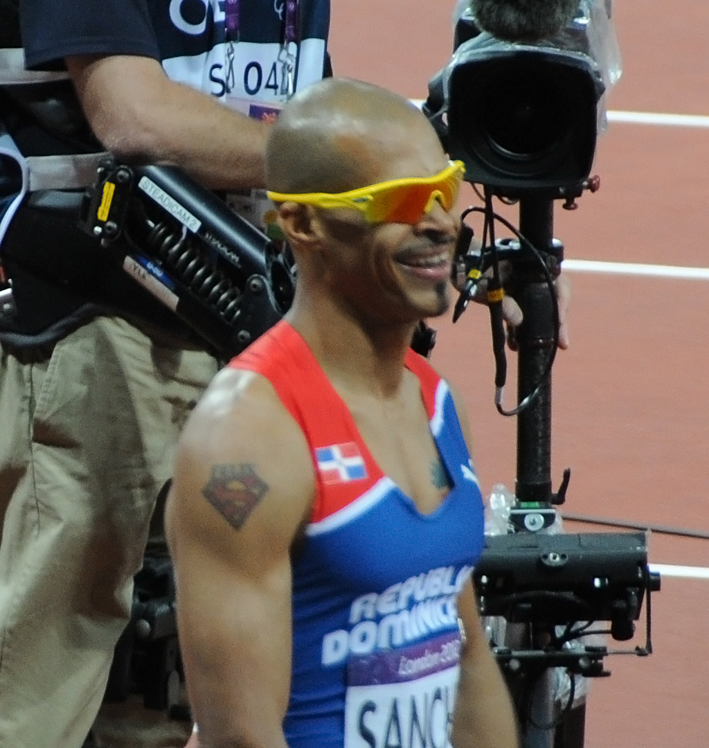 Felix Sanchez fêtant sa victoire aux 400m haies aux JO de Londres 2012.